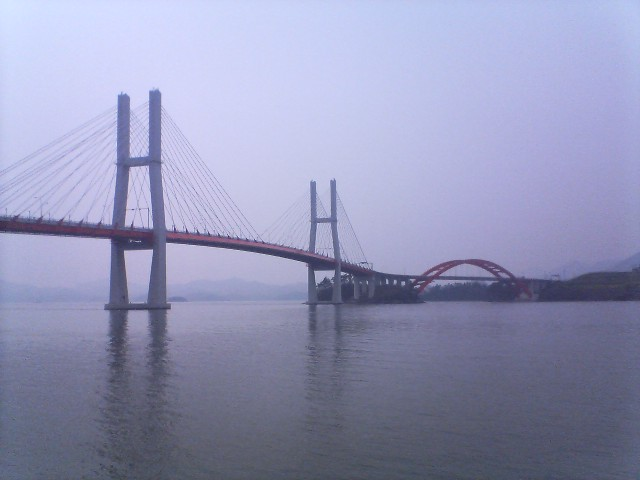 창선·삼천포대교